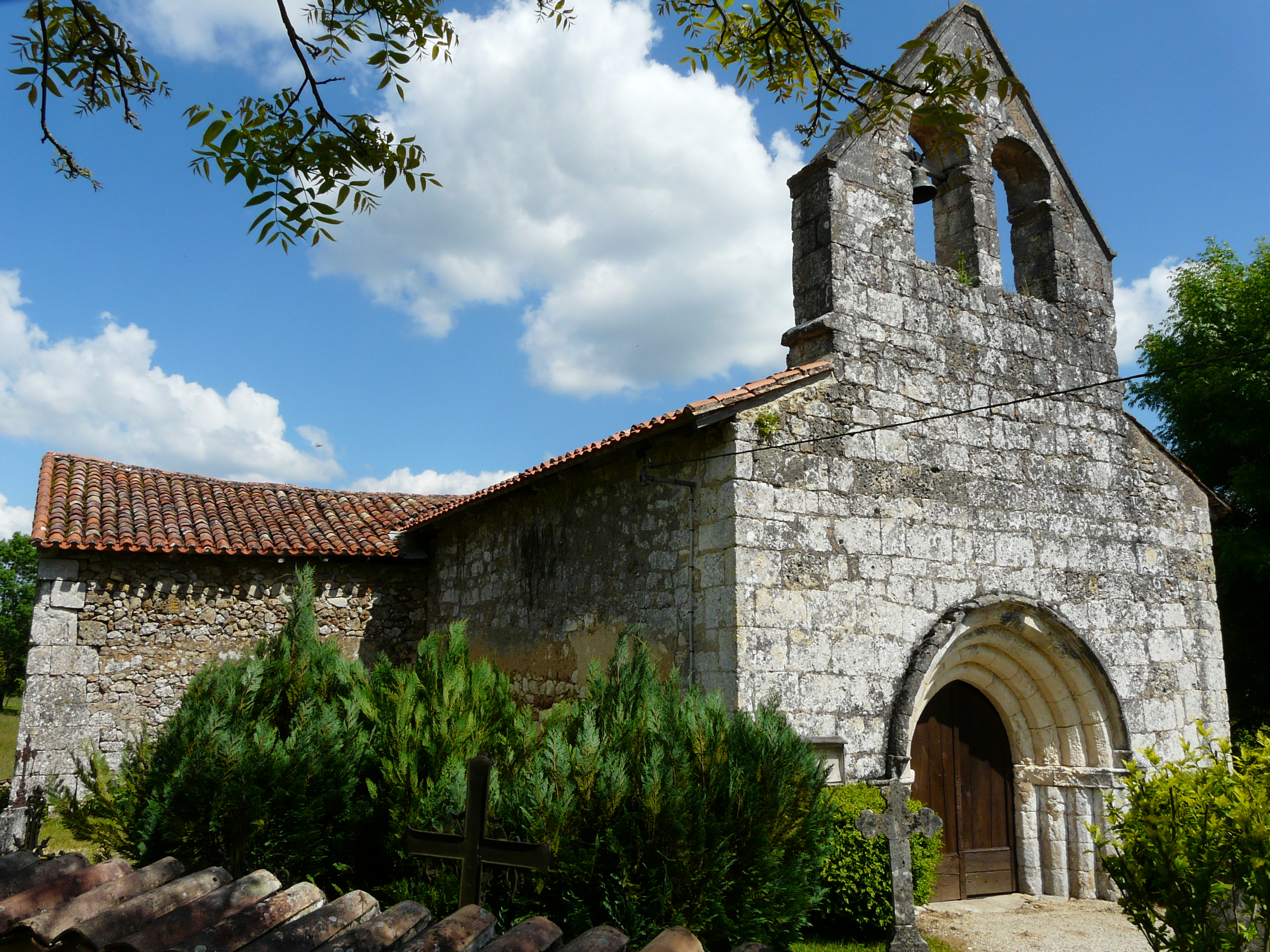 L'église Notre-Dame de Bassac vue depuis le nord-ouest, Beauregard-et-Bassac, Dordogne, France.